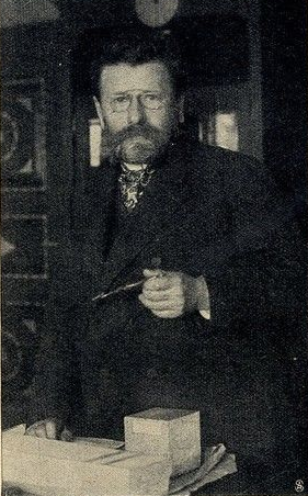 Professor Karl Hocheder, 1906